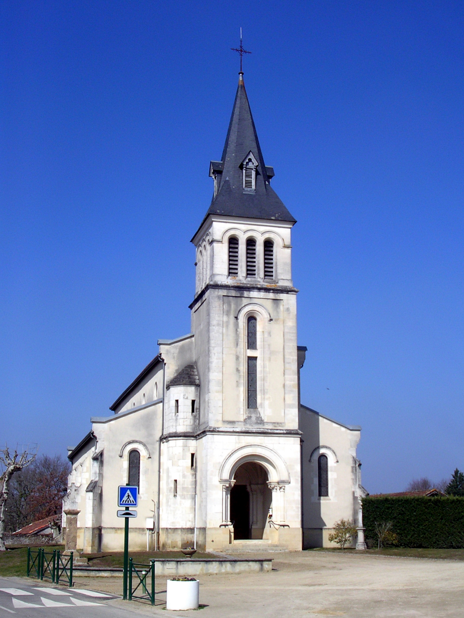 Église Saint-Laurent-et-Saint-Girons de Luglon, dans le département français des Landes